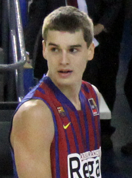 Mario Hezonja - FC Barcelona B